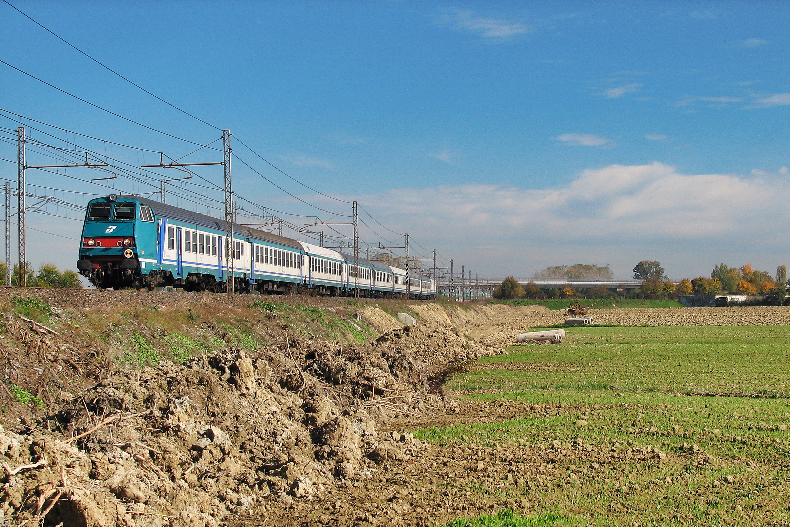 Una composizione di MDVE e MDVC, spinta da una E.464, transita sulla Linea Storica nei pressi dell'ex Bivio Mirano lungo la tratta a quattro binari tra Padova e Venezia Mestre; sulla sinistra si riconosce chiaramente la linea aerea della parallela Linea AV/AC.